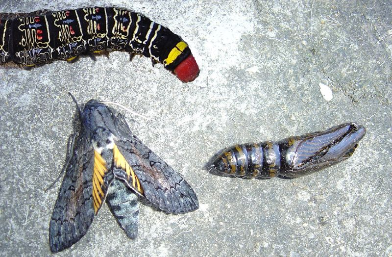 Esta colagem mostra as fases de lagarta, crisálida e mariposa de uma visitante de meu jardim. Especial para minha amiga Ana Valéria não vir a se decepcionar com a dela...